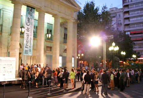 III Festival de cine de Alicante